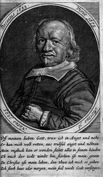 Hermann Löher, Porträt, Kupferstich, aus: Hermann Löher, Hochnötige Unterthanige Wemütige Klage Der Frommen Unschültigen, Amsterdam 1676. (St. Michael-Gymnasium Bad Münstereifel)